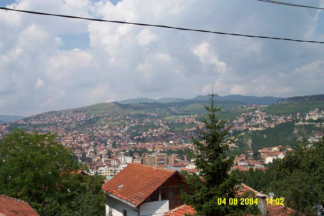 Pohled na Sarajevo